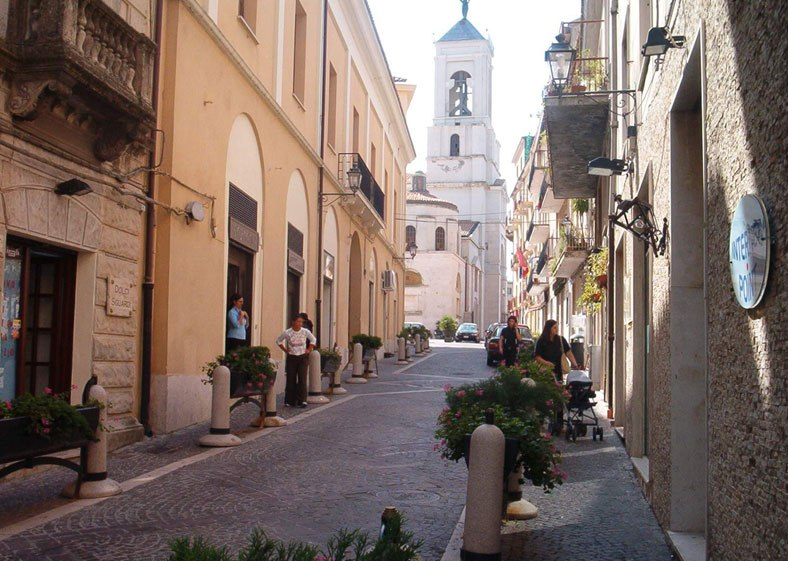 Il campanile del duomo di Catanzaro personale aquilagiallorossa